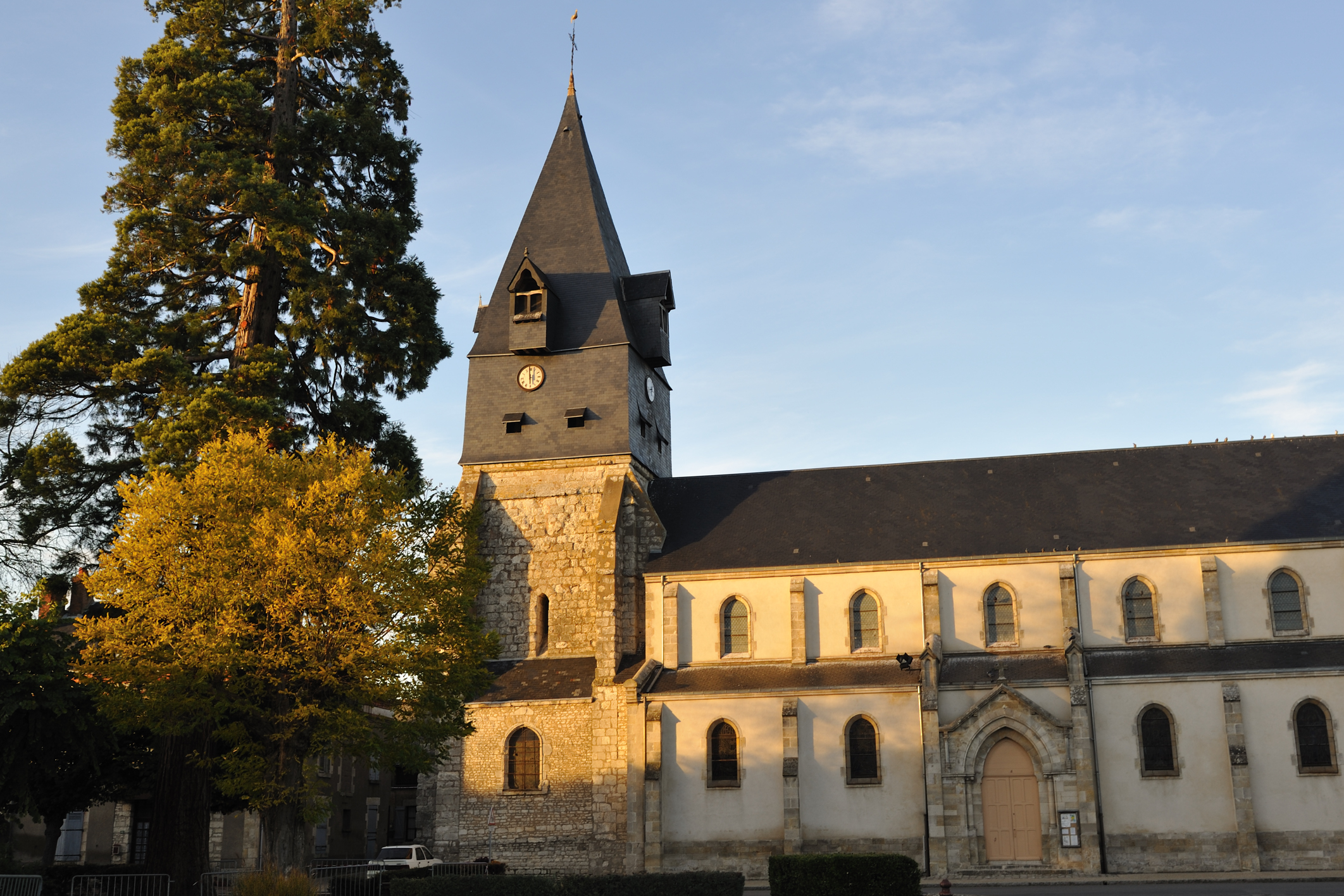 Église Notre-Dame, Aschères-le-Marché, Loiret, France